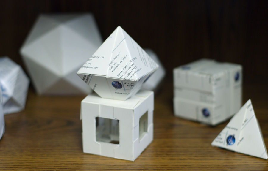 Business card origami (and kirigami)